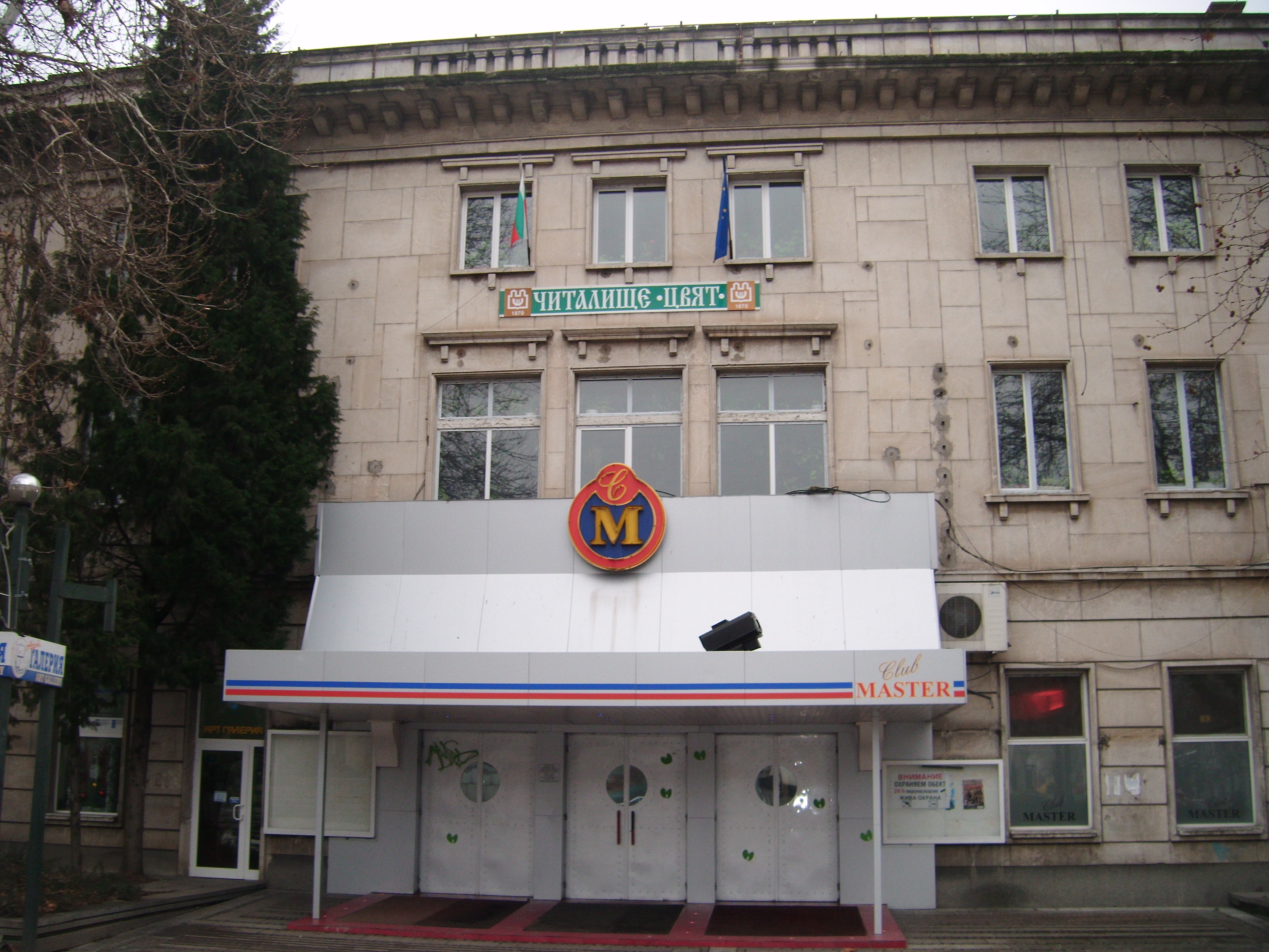 кино "Цвят"